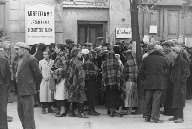 Radom / Polen, vor dem Arbeitsamt Associated Press Bild, Berlin Sie dürfen wieder arbeiten. In vielen Städten und Ortschaften der von den deutschen Truppen besetzten ehemaligen polnischen Gebieten ist bereits das Arbeitsamt eingezogen, um Volksdeutschen und Polen Arbeit zuzuteilen. UBz.: wartende Landarbeiter und Landarbeiterinnen vor dem Arbeitsamt in Radom. Viele unter ihnen waren jahrelang arbeitslos. Ber/Roth 4.10.39 [Herausgabedatum] 12383-39